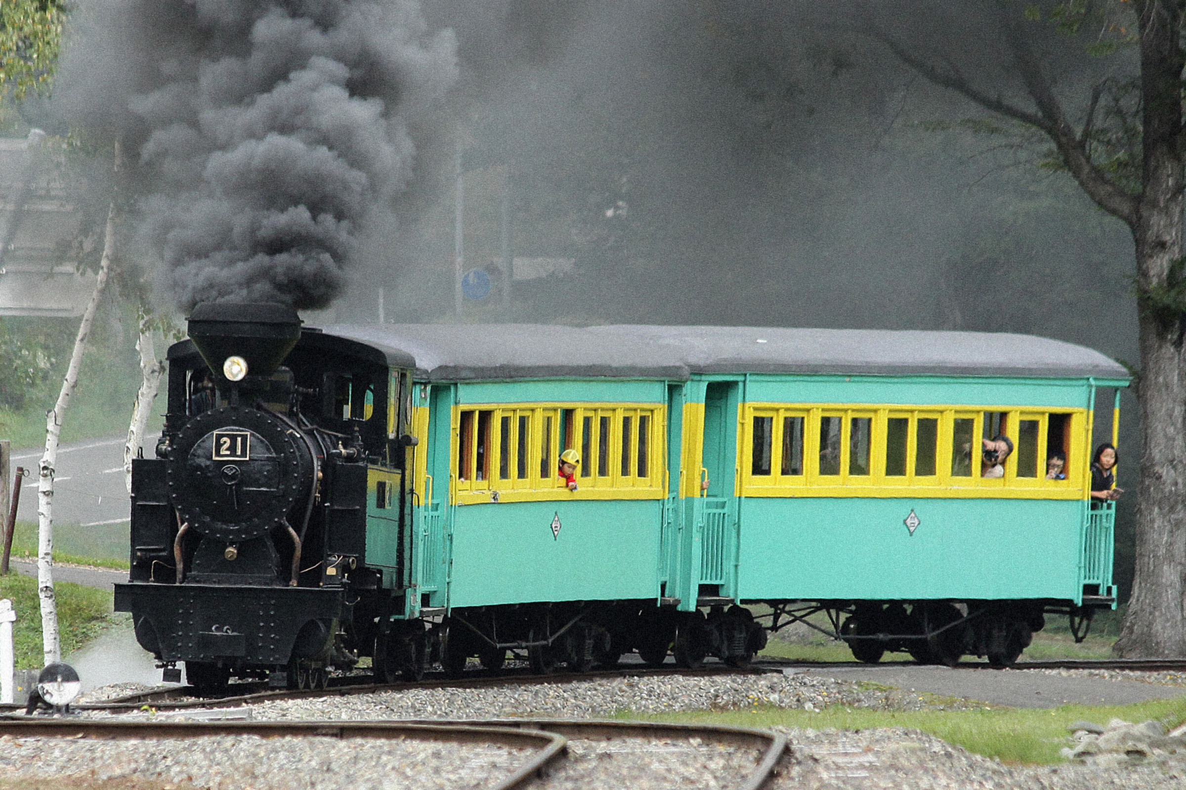 北海道遠軽町「丸瀬布森林公園いこいの森」で運行される雨宮21号蒸気機関車と井笠鉄道ホハ19、ホハ13客車。2014年撮影